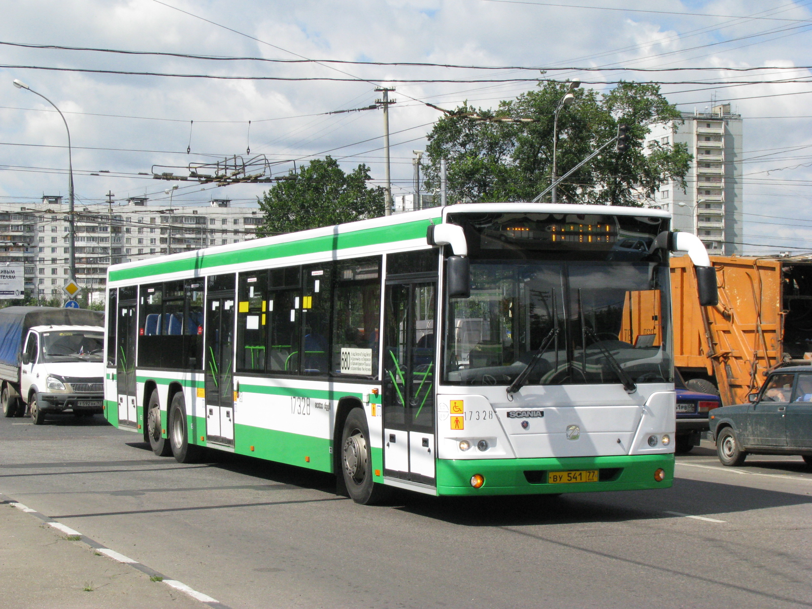 ГолАЗ-6228.00 № 17328, Россошанская ул.